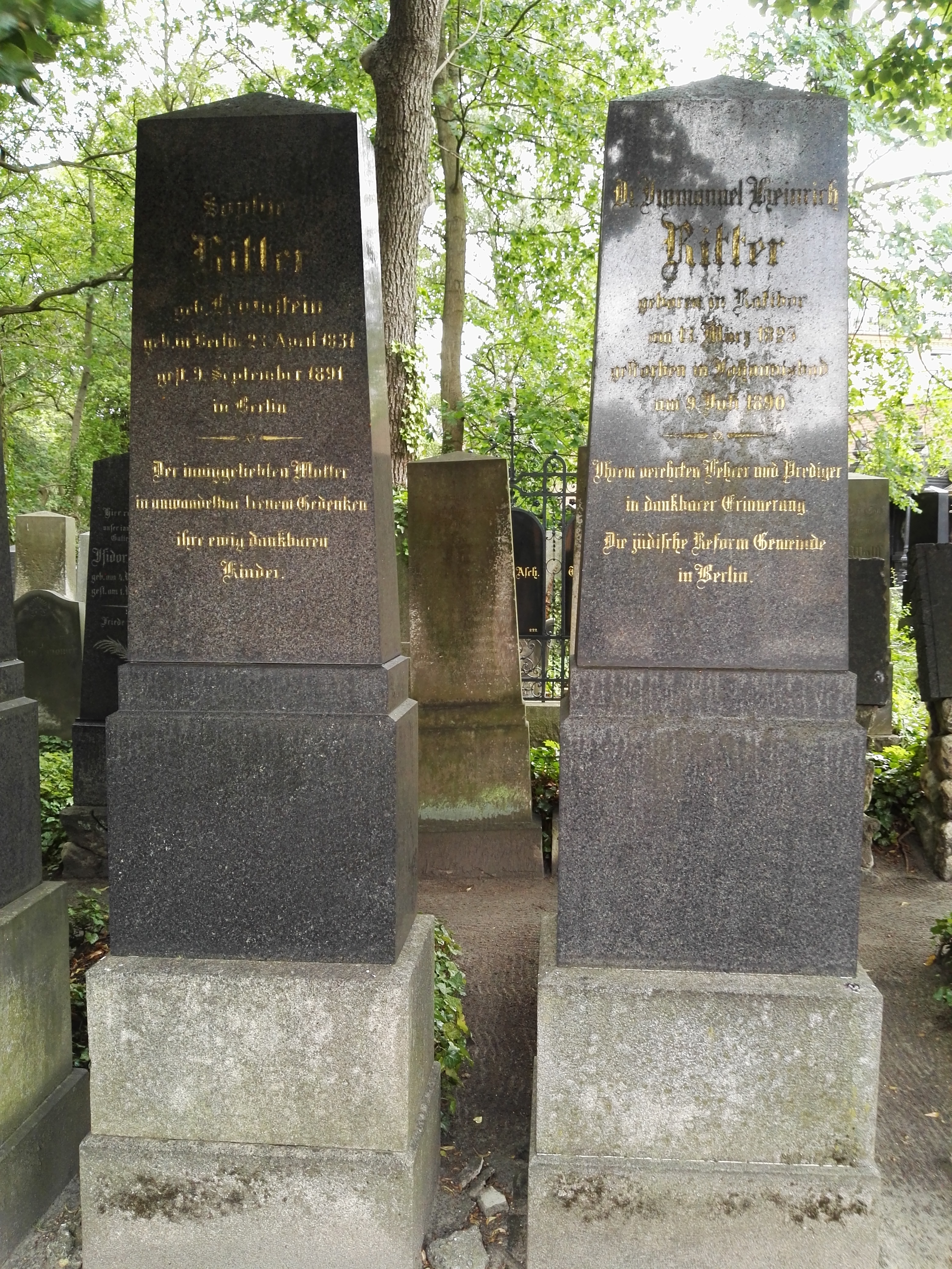 Grab von Immanuel Heinrich Ritter auf dem denkmalgeschützten Jüdischen Friedhof Berlin-Weißensee